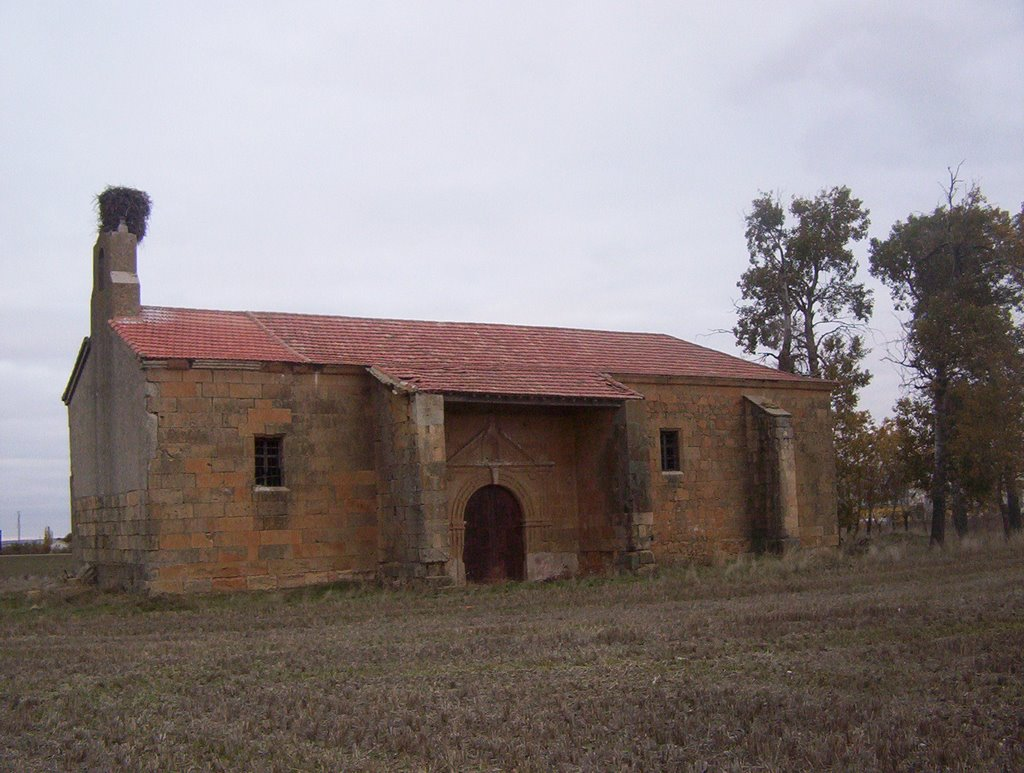 Ermita de Nuestra Señora de Gracia de Pedrosillo el Ralo datada del siglo XV. Se encuentra hacia el sur, a las afueras del pueblo.